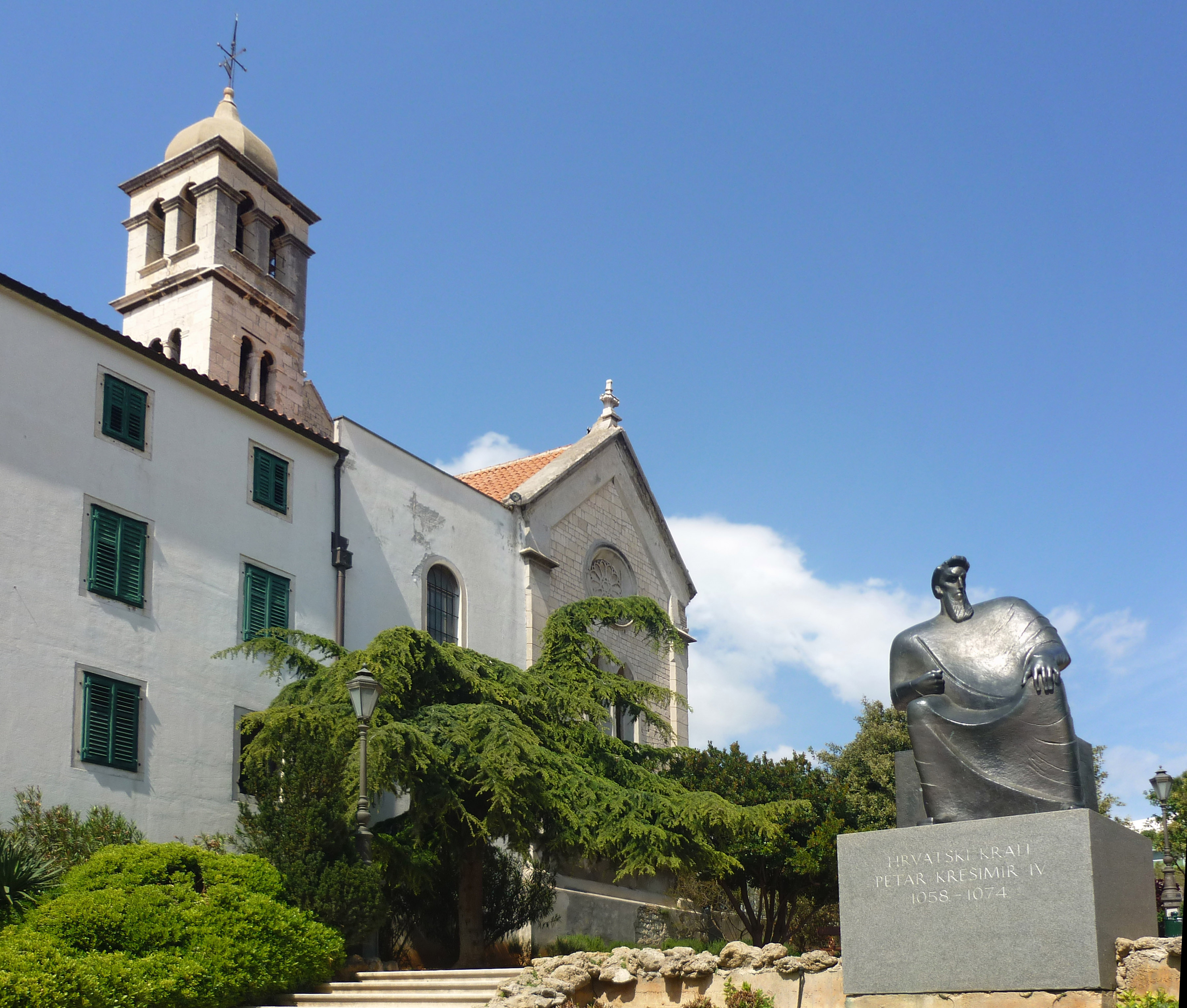 Franziskanerkloster in Šibenik (dt.: Sibenning, ital.: Sebenico)